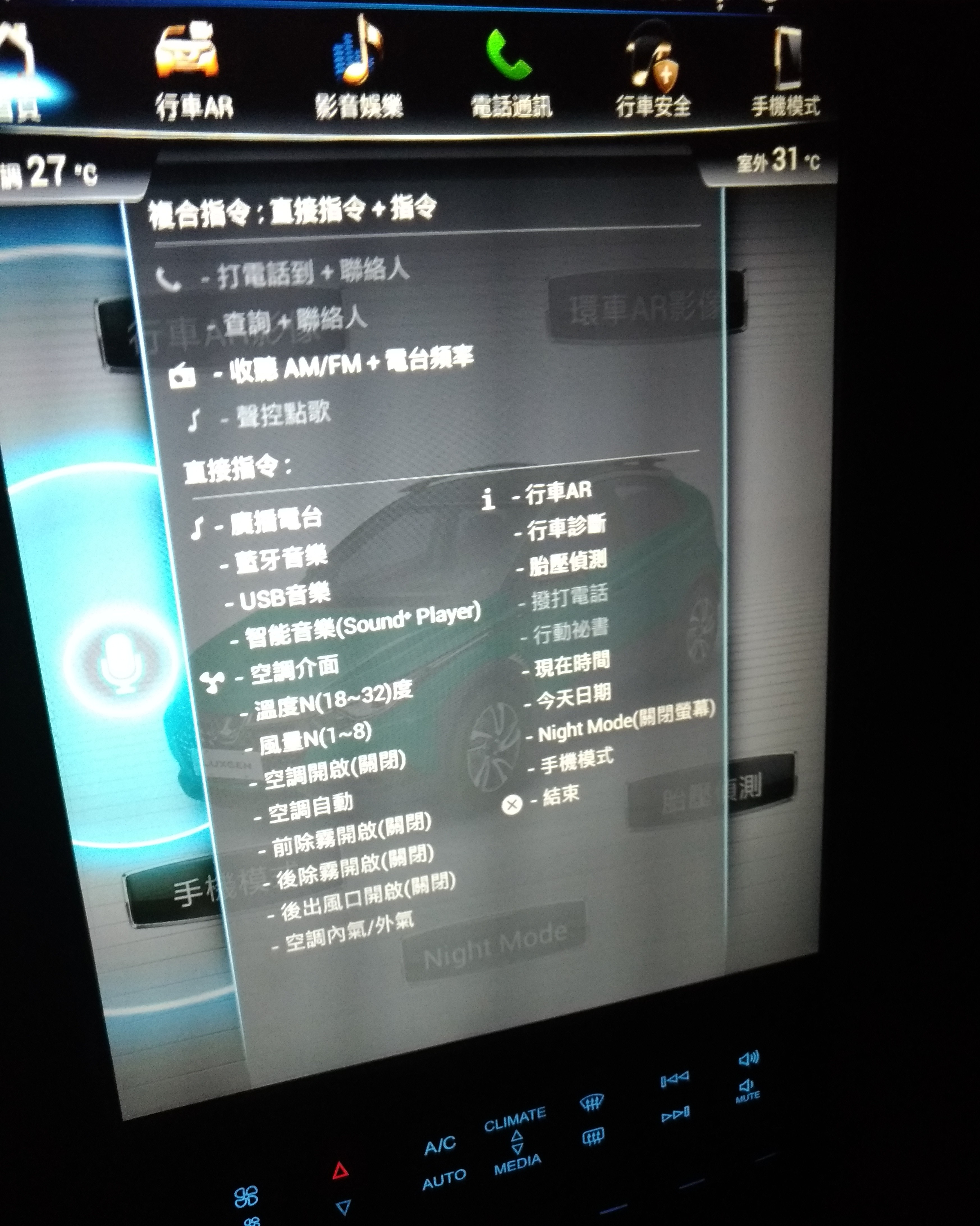 U5智慧電腦聲控指令